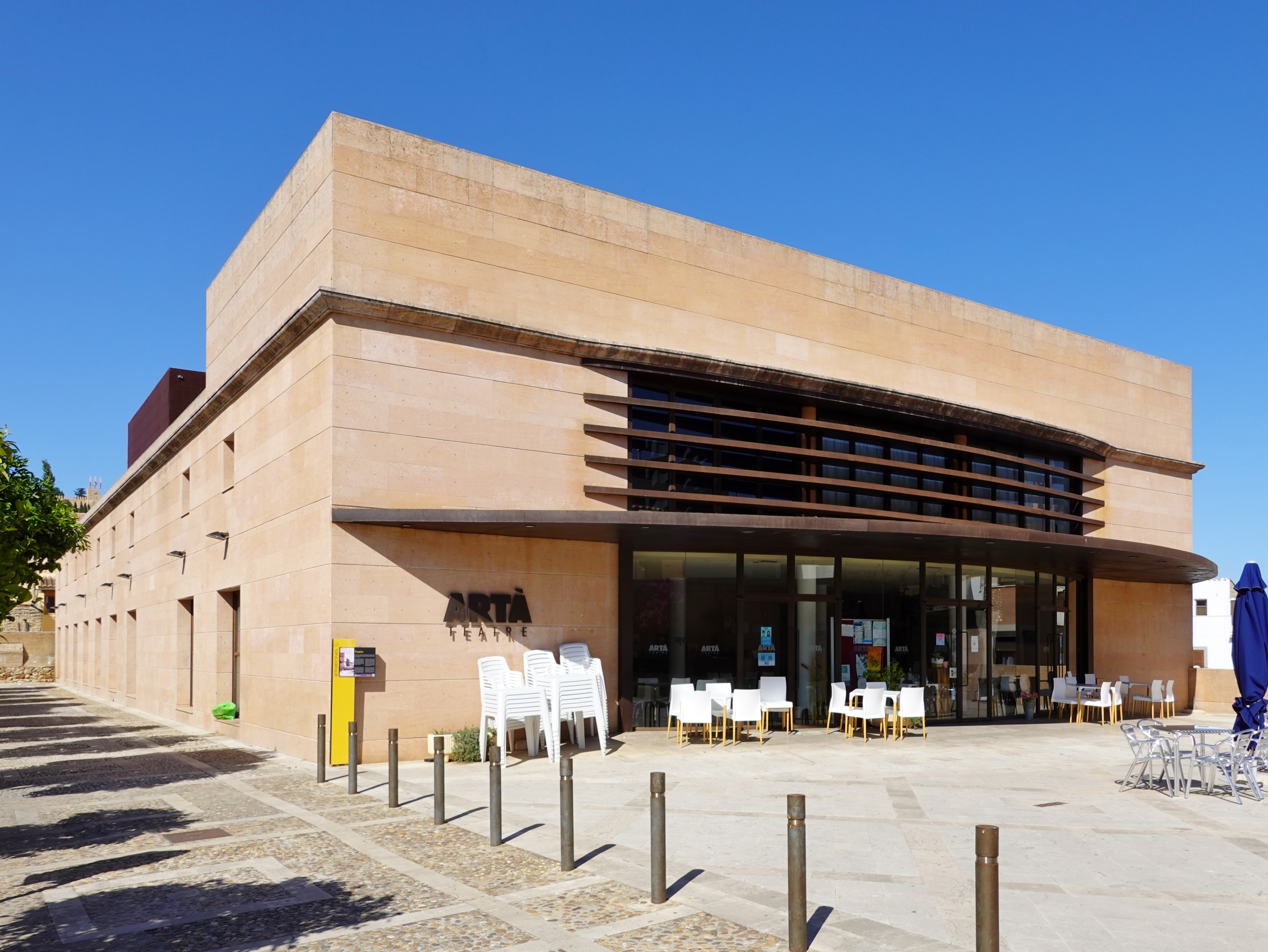 Theater von Artà (Teatre d’Artà), Mallorca, Spanien